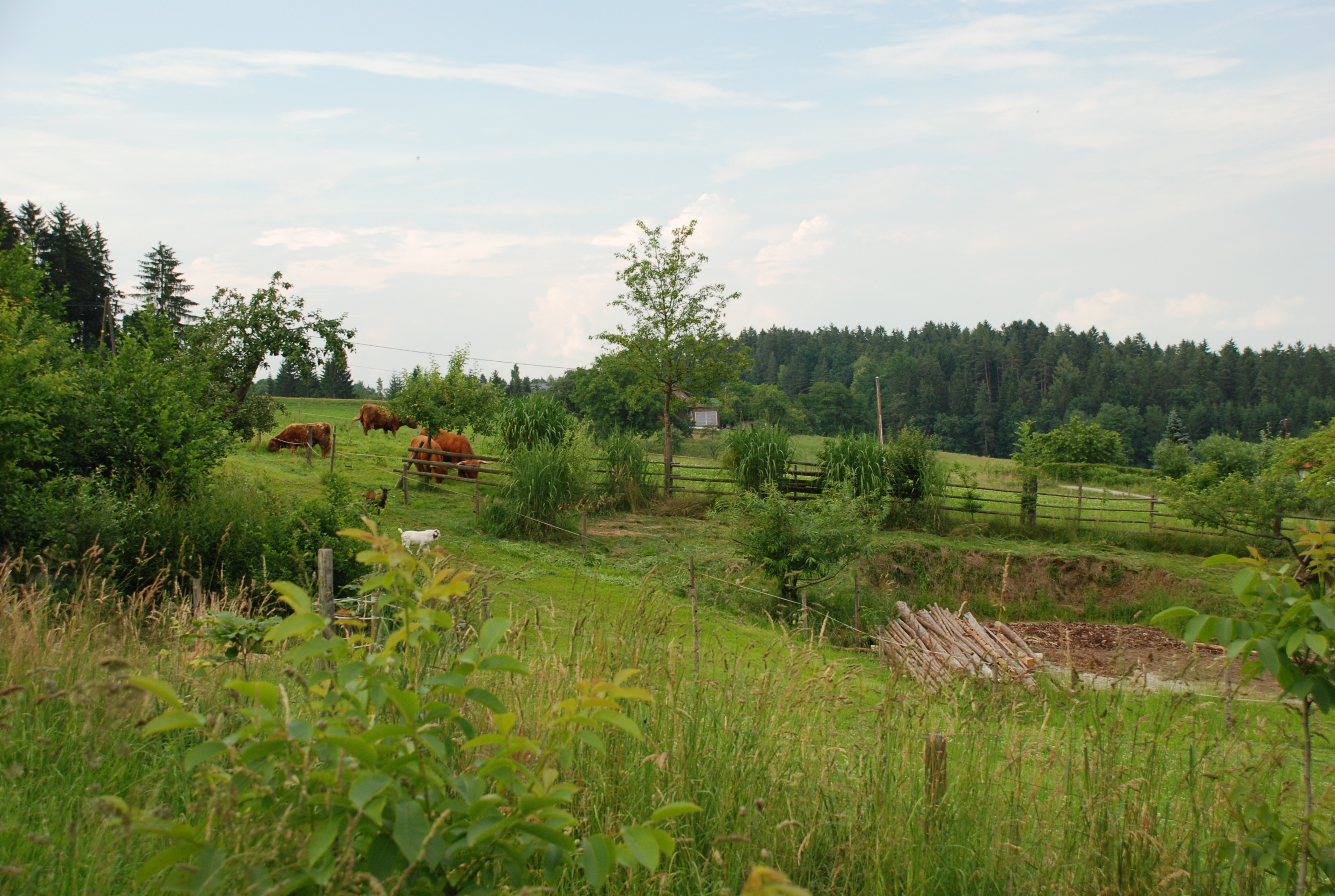 Grundflächennutzung in Laßnitz